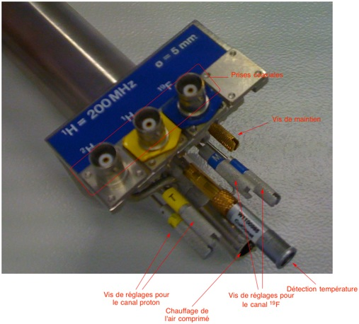 Description des entrées/sorties d'une sonde DUAL 19F/1H 200MHz